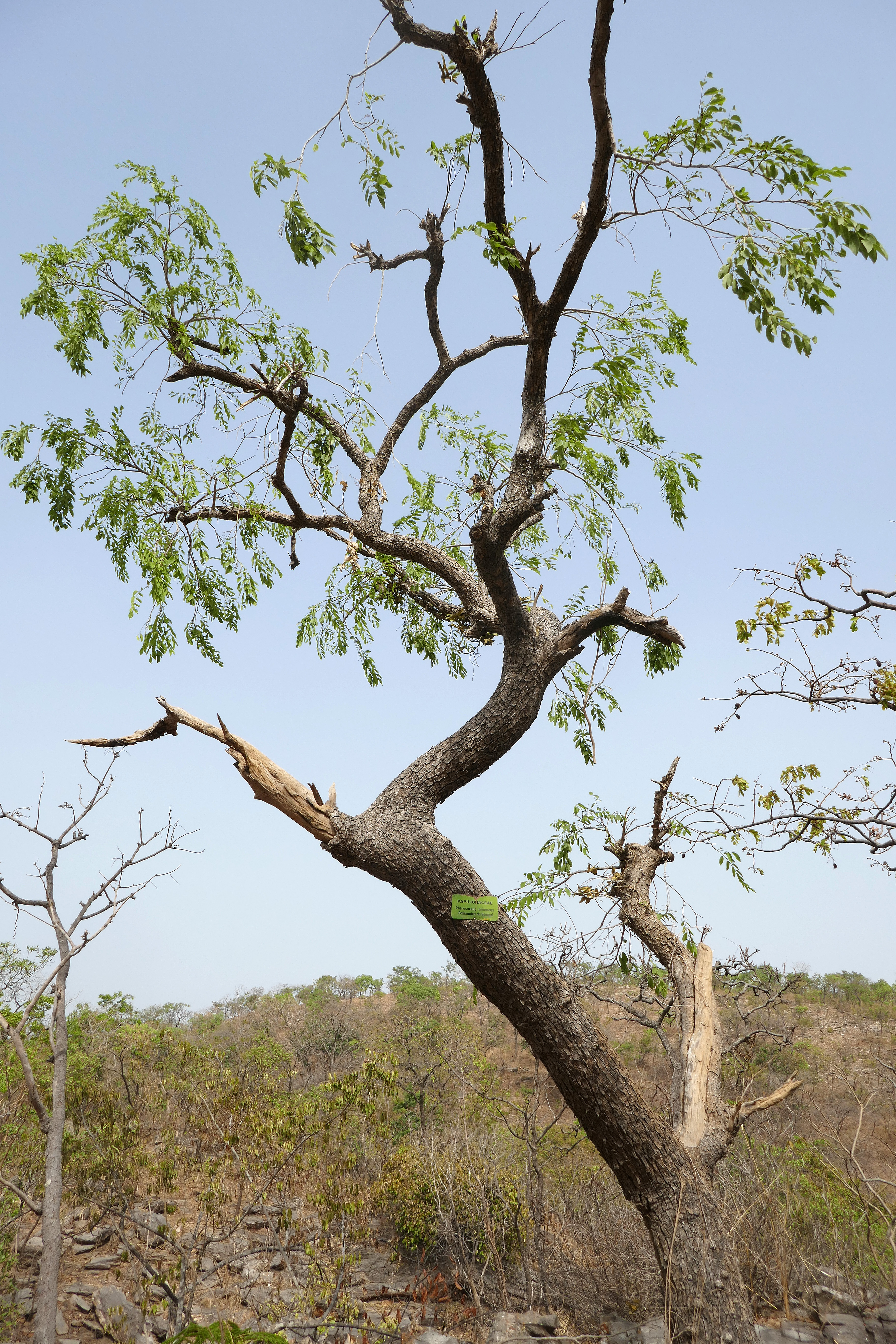 Pterocarpus erinaceus (ou Palissandre du Sénégal) au Bénin, dans l'Atakora, aux environs des chutes de Kota.